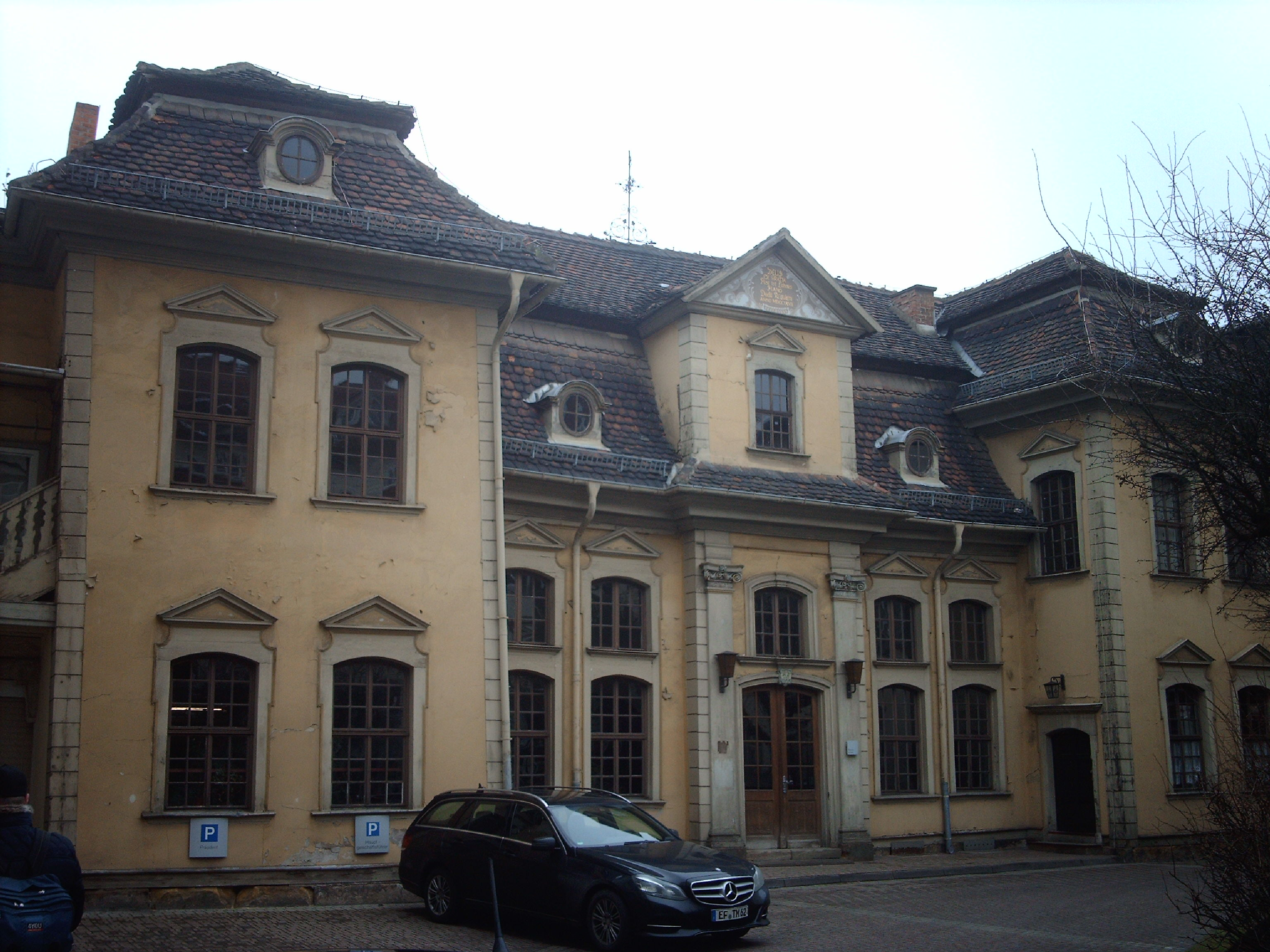 Barockschloß im Zentrum von Erfurt, mit Ausgang zur Waagegasse.